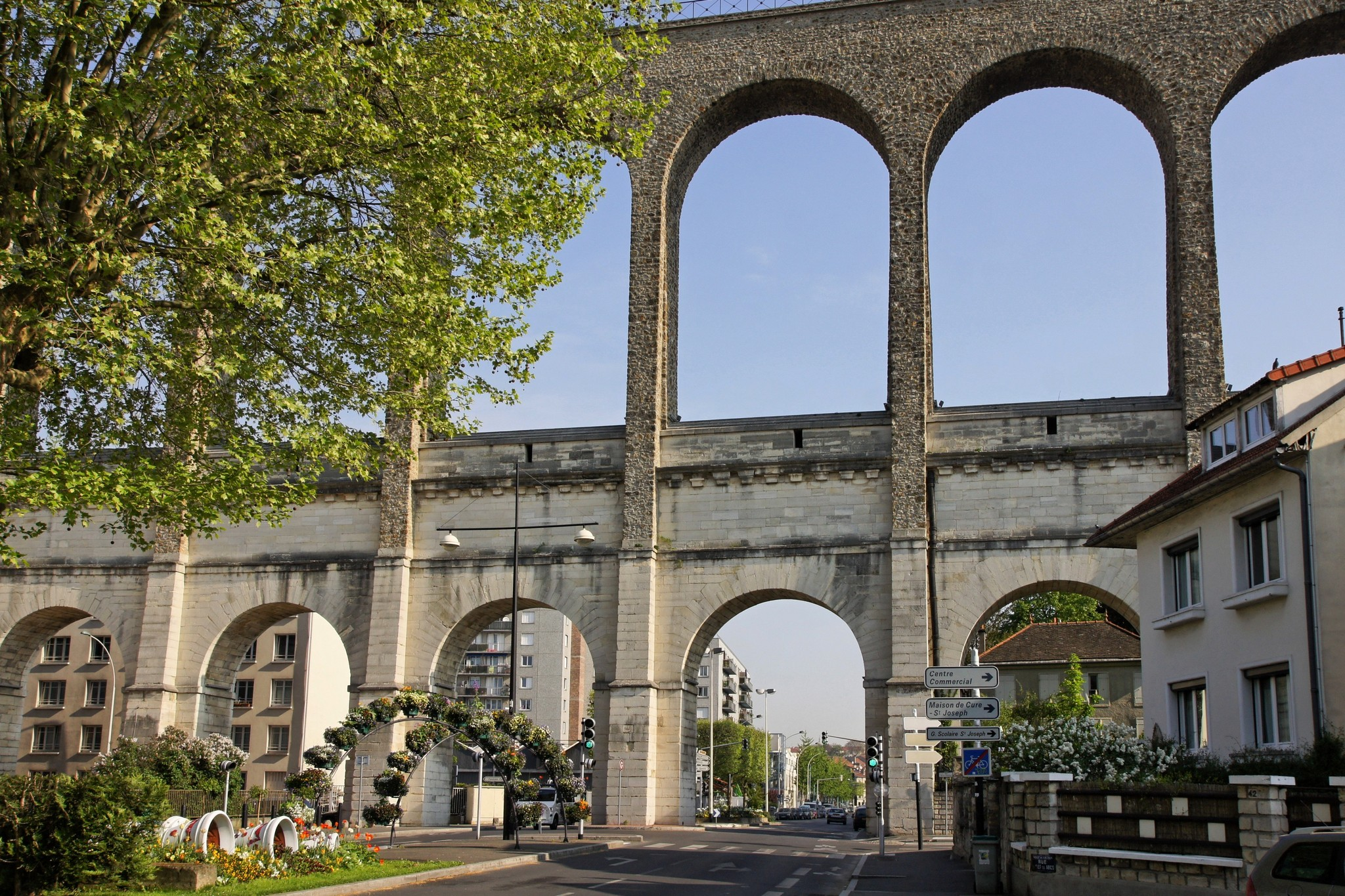 La limite entre Cachan et Arcueil (94) Pour plus d'informations sur cet Aqueduc